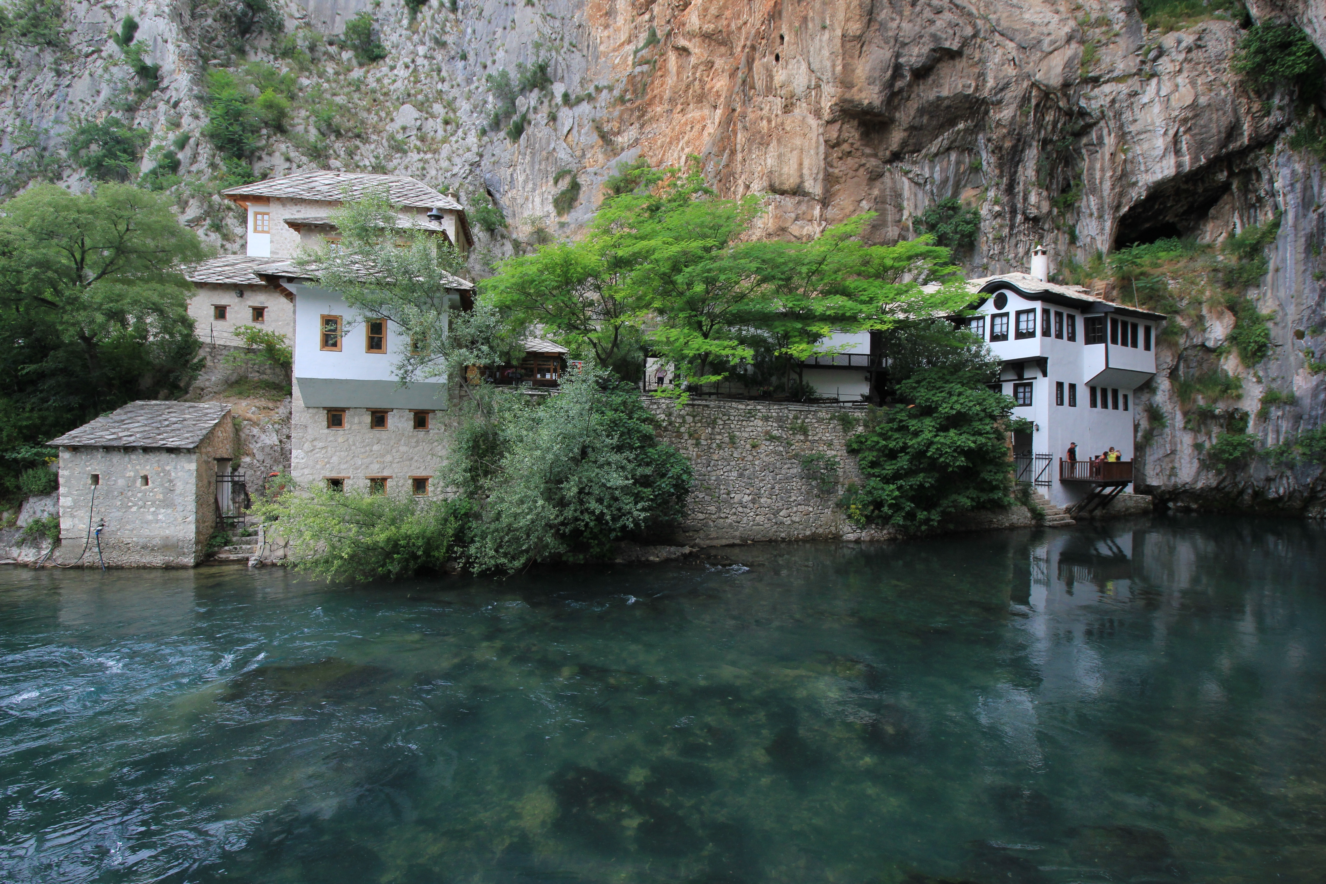 Quelle der Buna in Blagaj